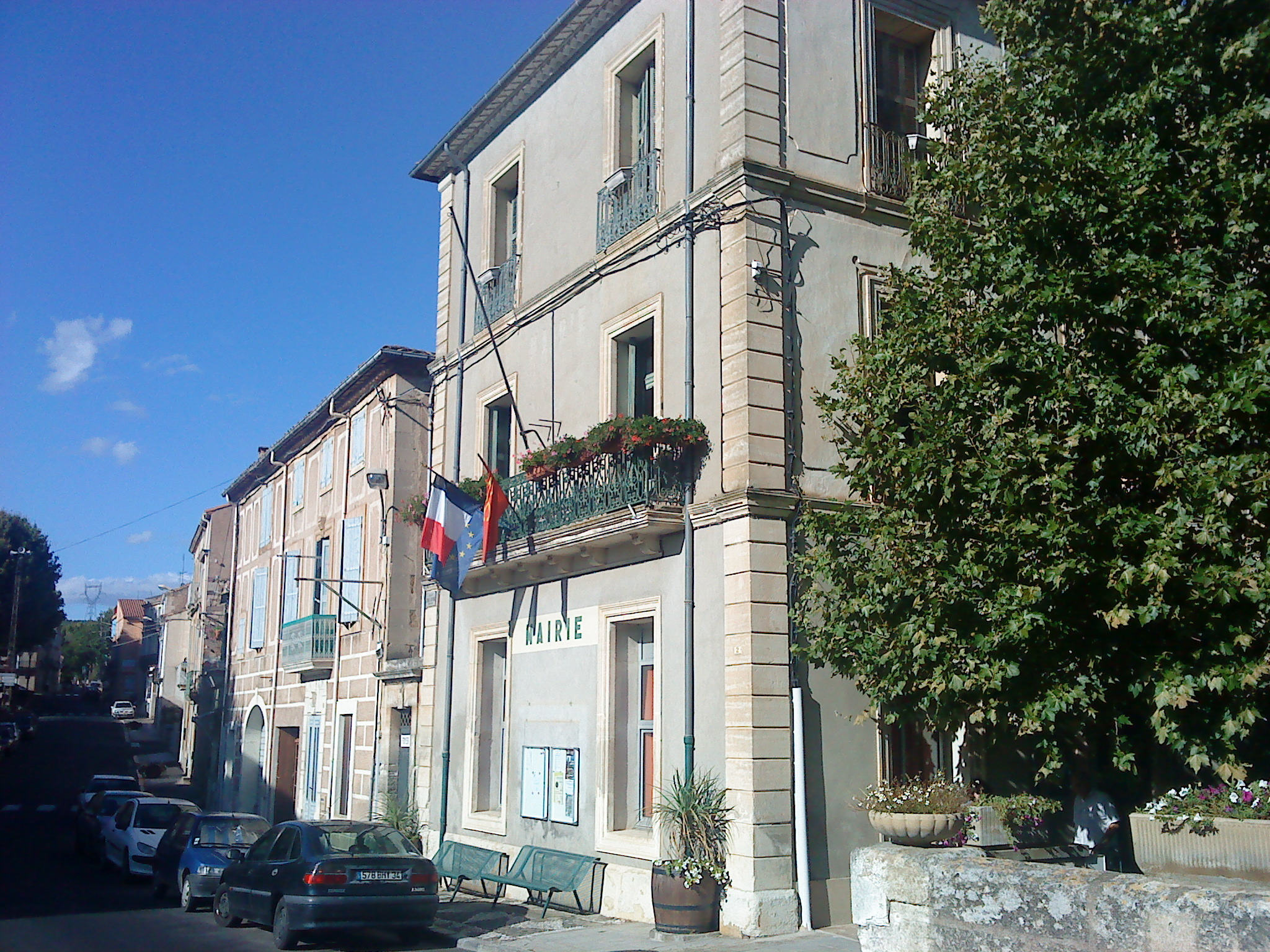 Mairie de Cruzy (Hérault, France)